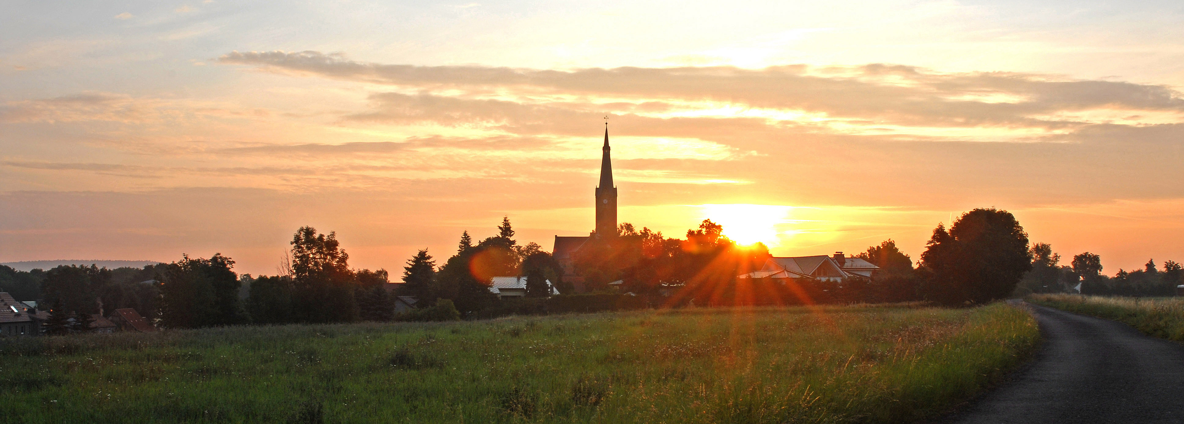 Morgenstimmung in Wechmar